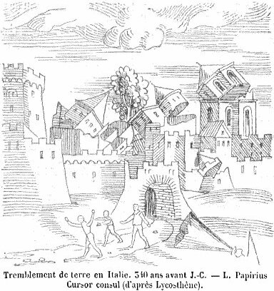 illustration extraite Prodigiorum ac ostentorum chroniconde Lycosthène